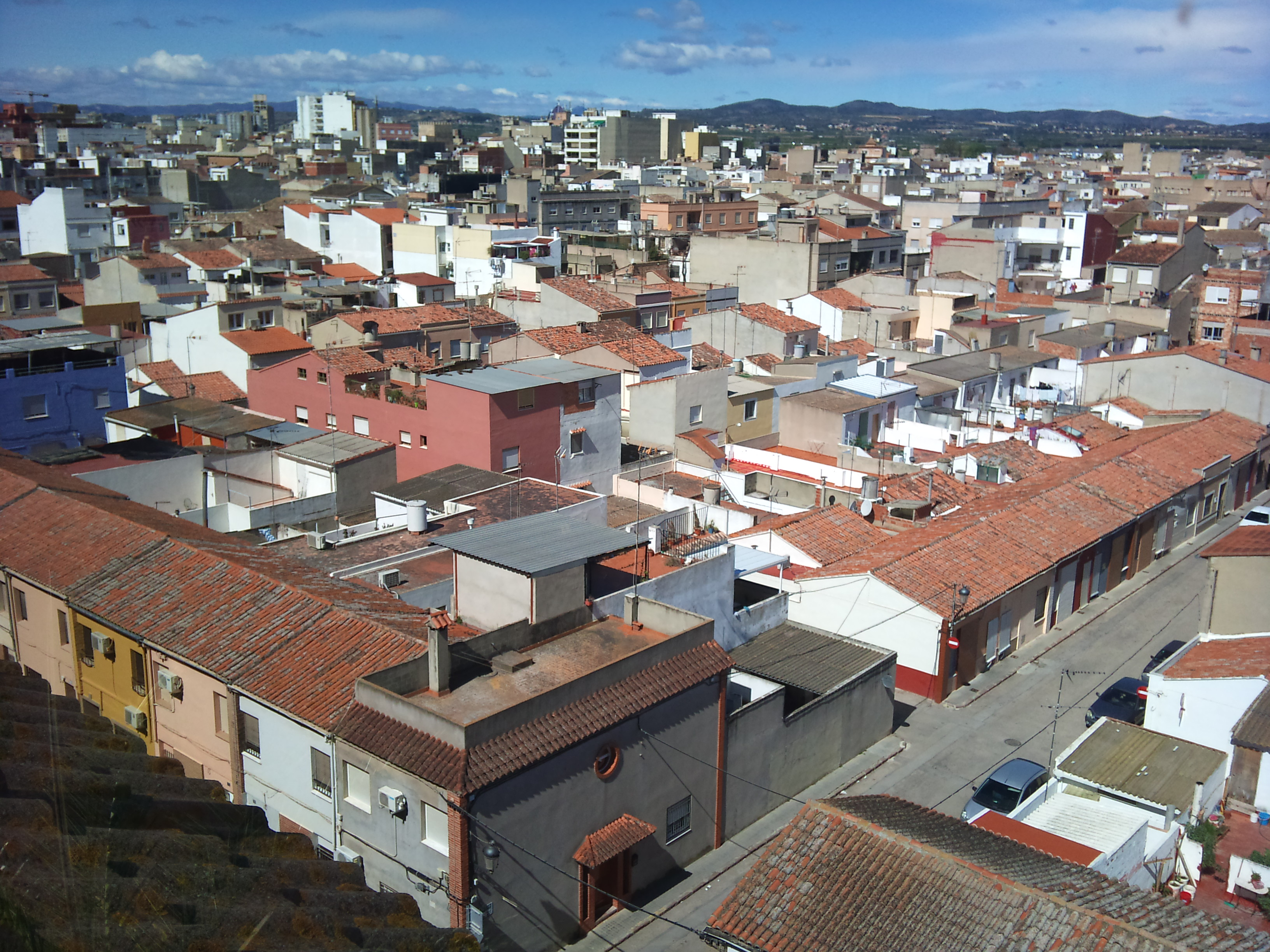 Vista general de Benifaió, Ribera Alta